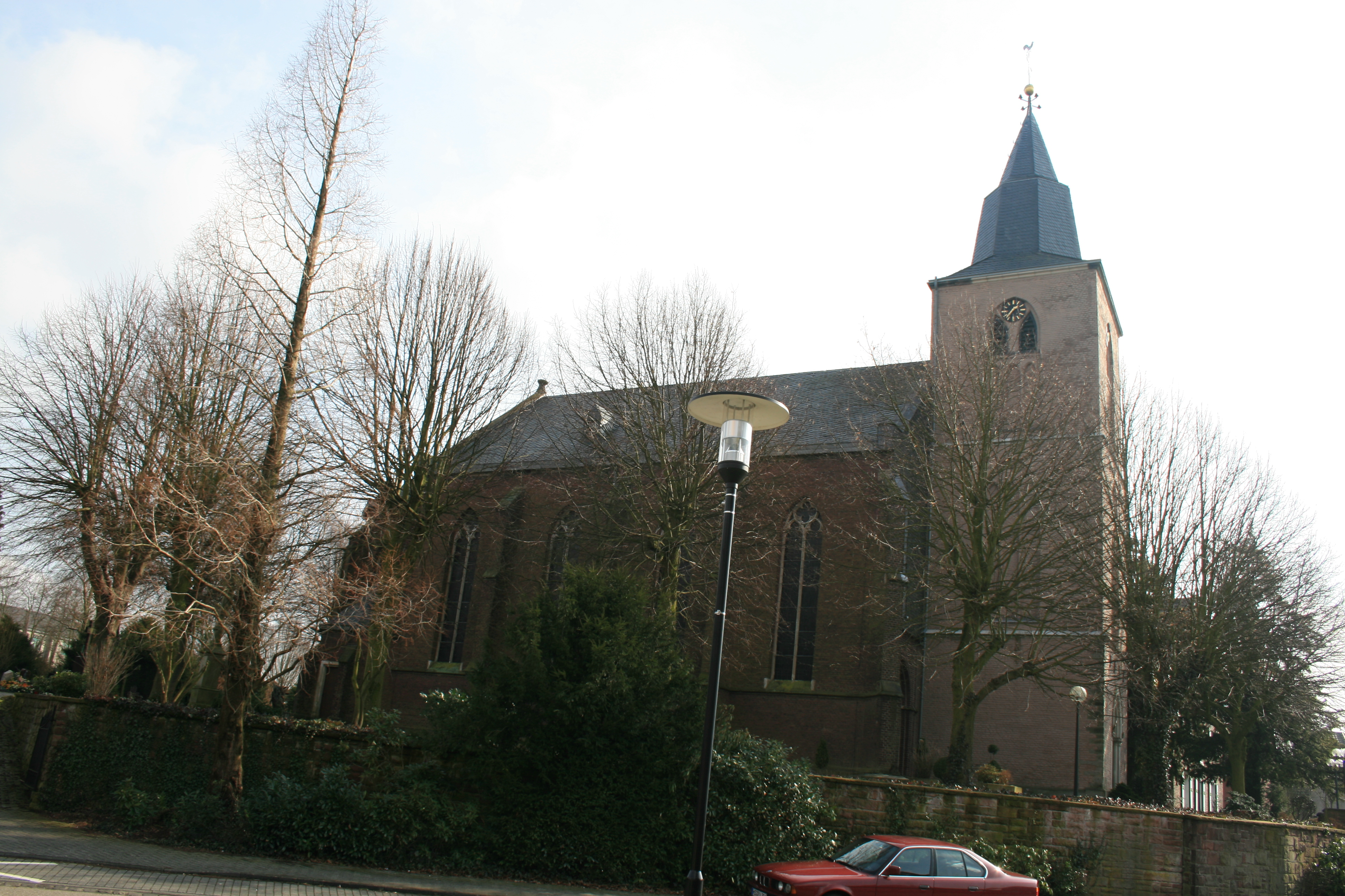 Pfarrkirche in Teveren